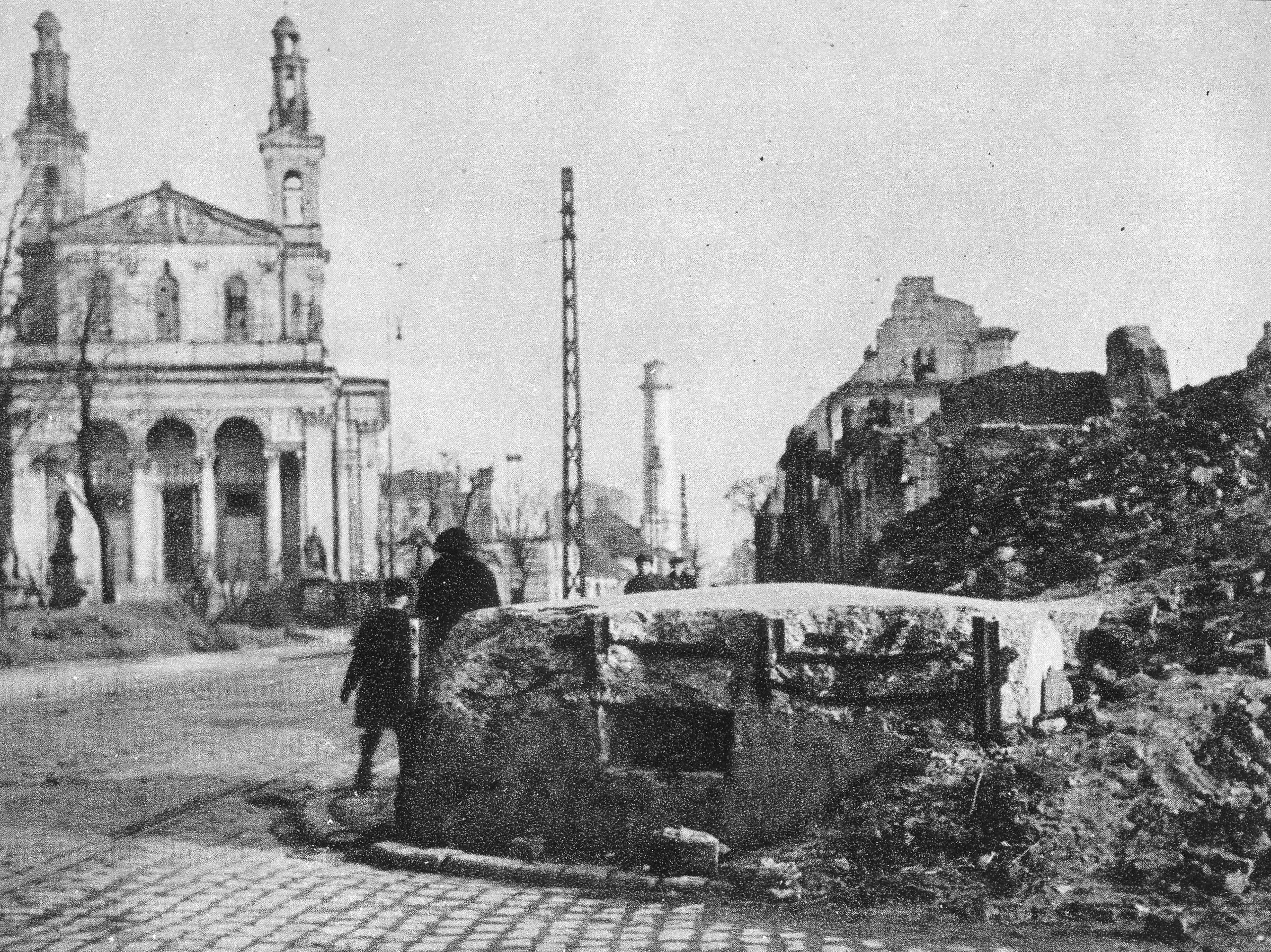 Ulica Chłodna w Warszawie w 1945, widok ze skrzyżowania z ul. Waliców. Widoczny uszkodzony bunkier niemiecki